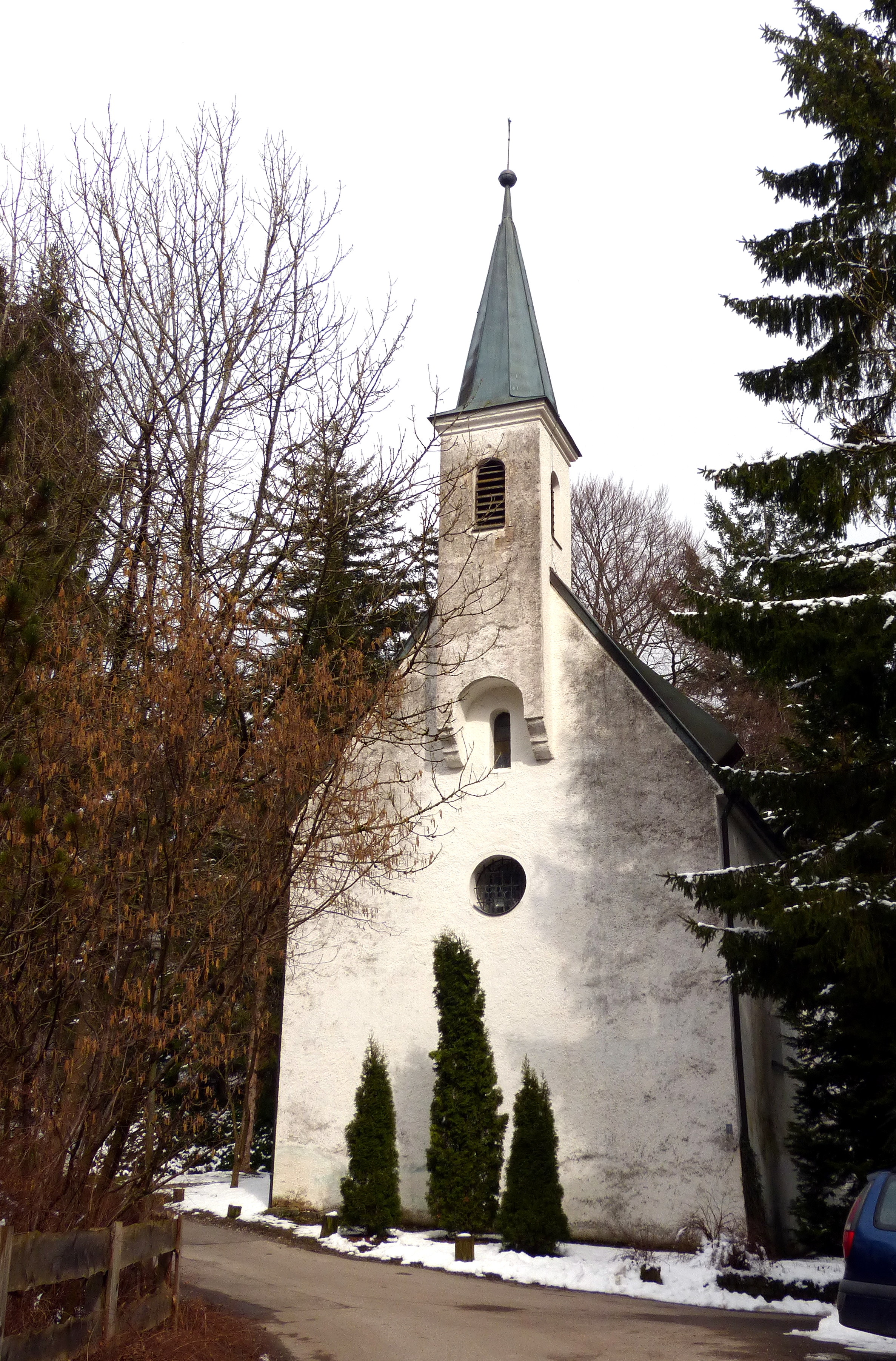 Berg am Starnberger See, OT Mörlbach, Stephaniweg 3. Katholische Filialkirche St. Stephan, ein spätgotischer Bau mit Dachreiter, erbaut am Ende des 15. Jahrhunderts. This is a photograph of an architectural monument.